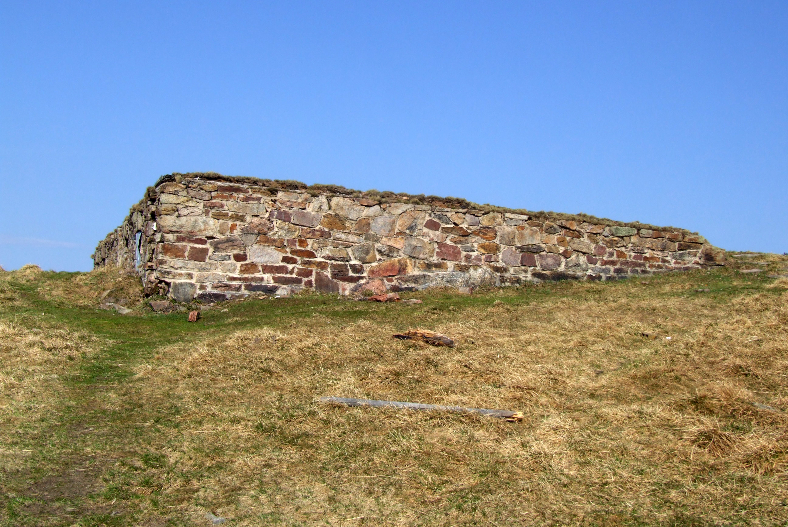 Zbytky Lichtenštejnovy chaty na Králickém Sněžníku, zbořené v roce 1971